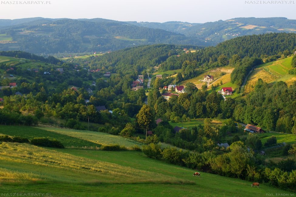 Jaworzna widok na wieś.